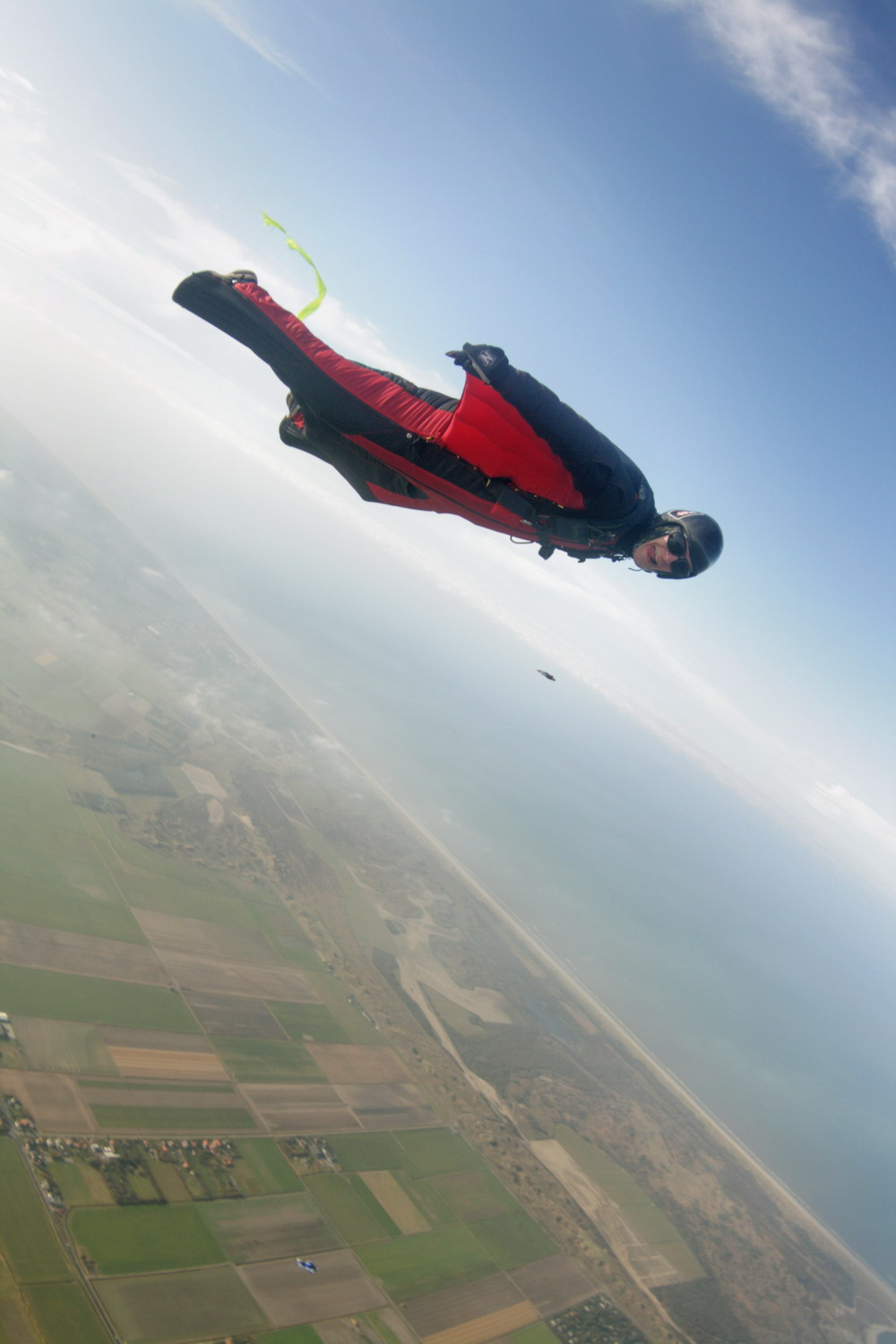 Wingsuit flyer at Holland wingsuit boogies